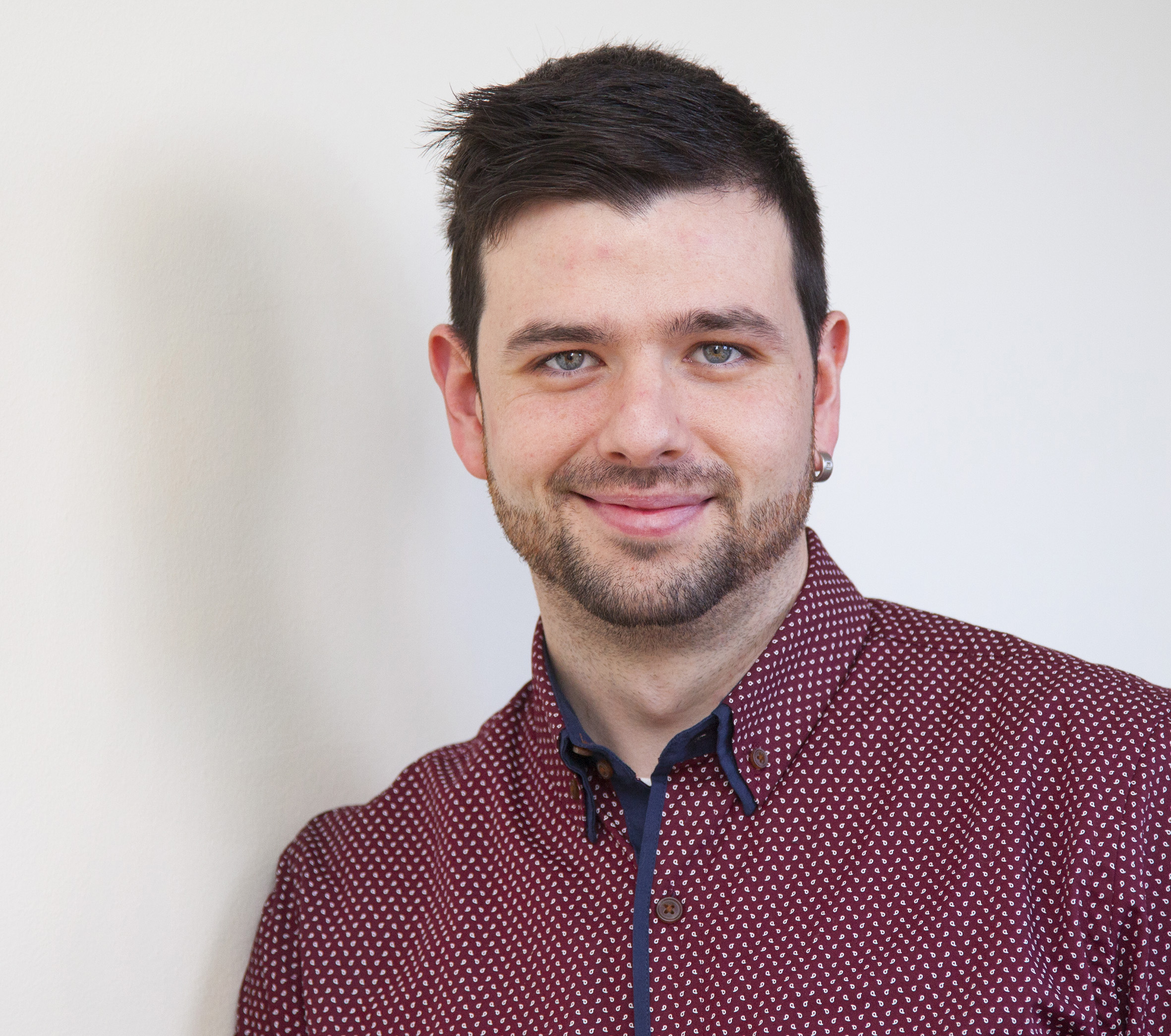 Jason Evans, Wicipediwr Preswyl newydd Llyfrgell Genedlaethol Cymru